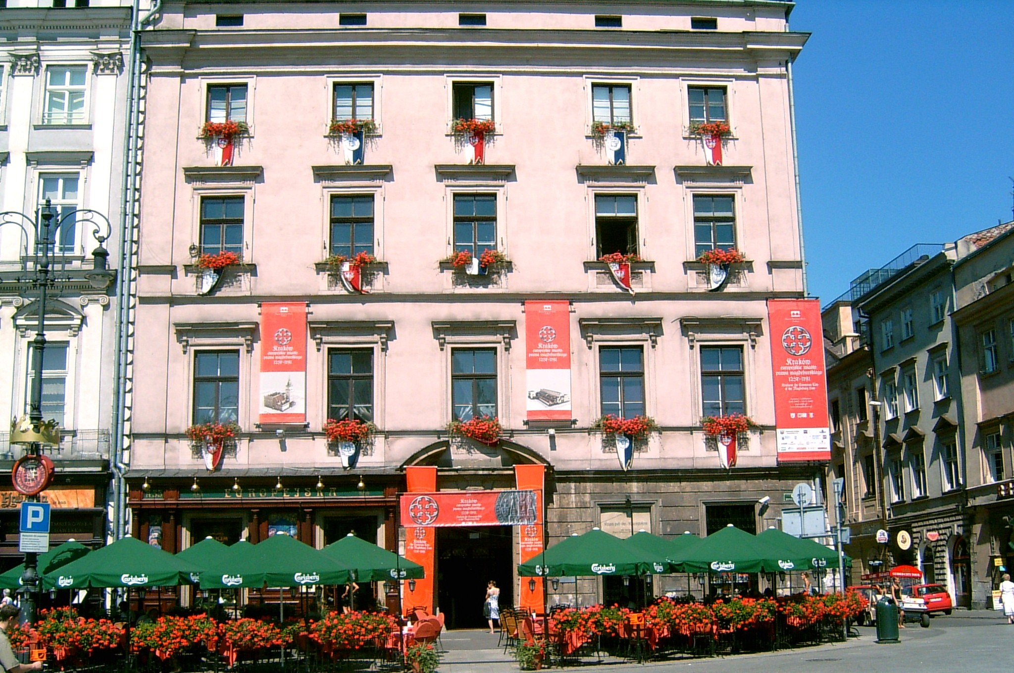 Kraków, Poland